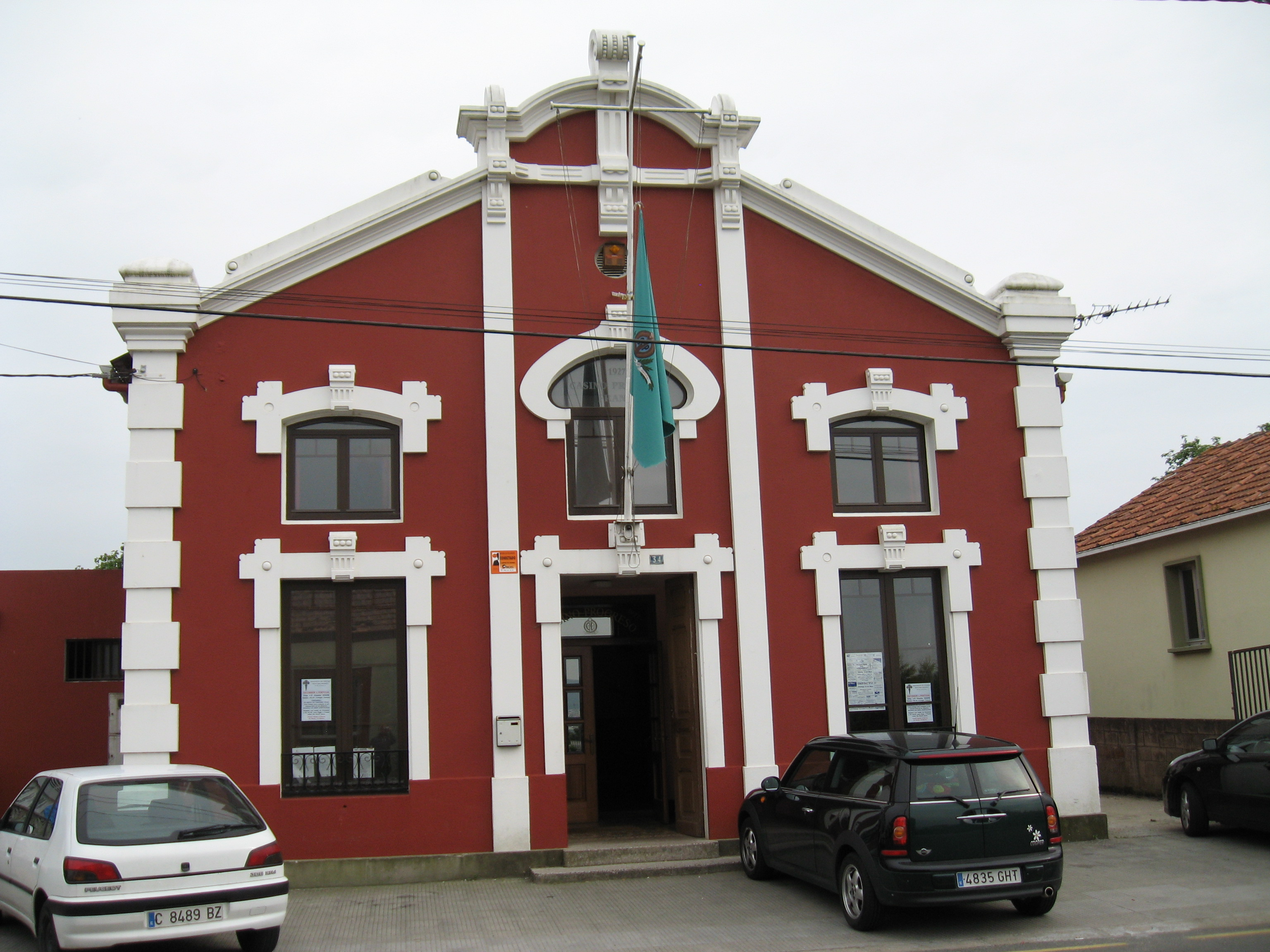 Local cultural de estilo modernista (1927) mais conhecido por seu nome antigo Casino Progreso de Franza.